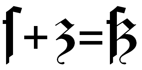 Powstanie niemieckiej litery ẞ ß.